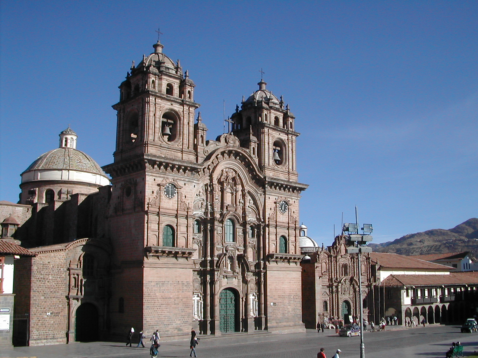 Foto da Igreja da Companhia de Jesus em Cusco, Peru. Descrição Igreja da Companhia de Jesus em Cusco, cidade de Cusco, Peru. Fonte Fotografada por Edson Luis Pedrassani Licença GFDL